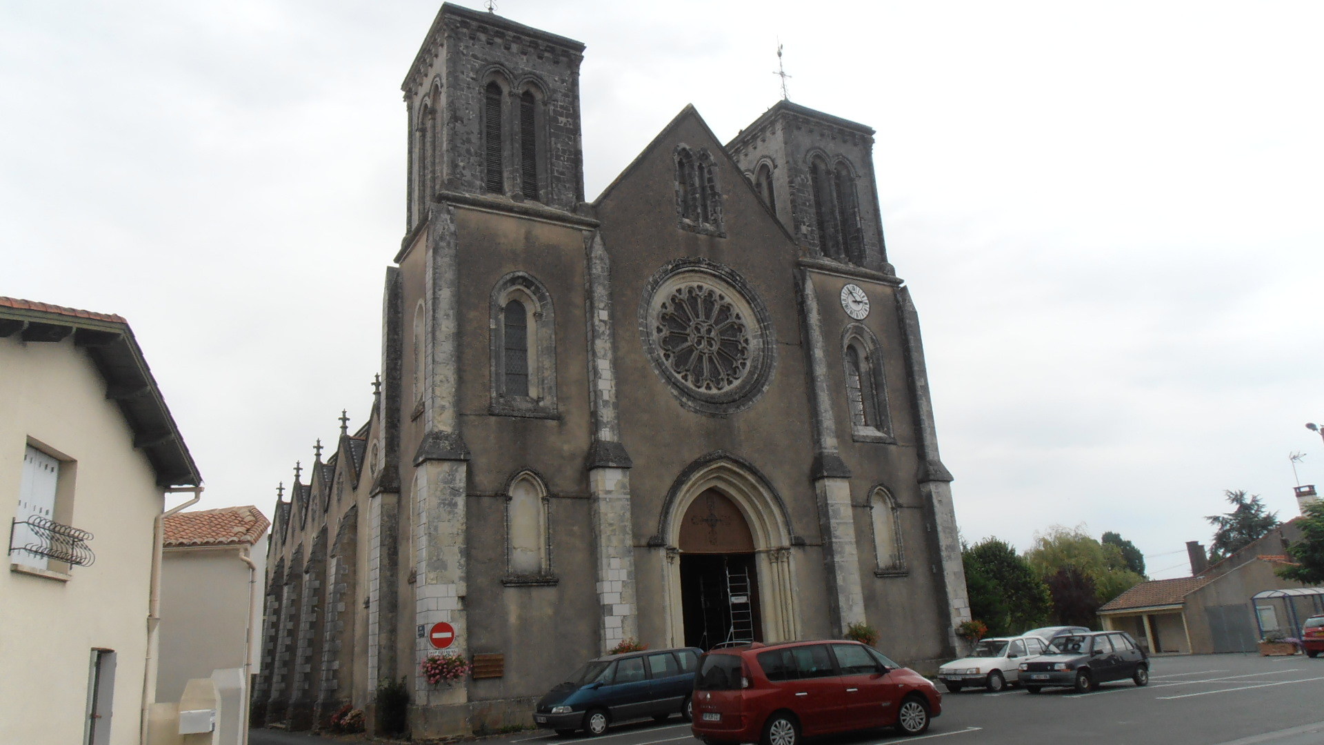 Église de Saint-Laurent-des-Autels (Maine-et-Loire, France).